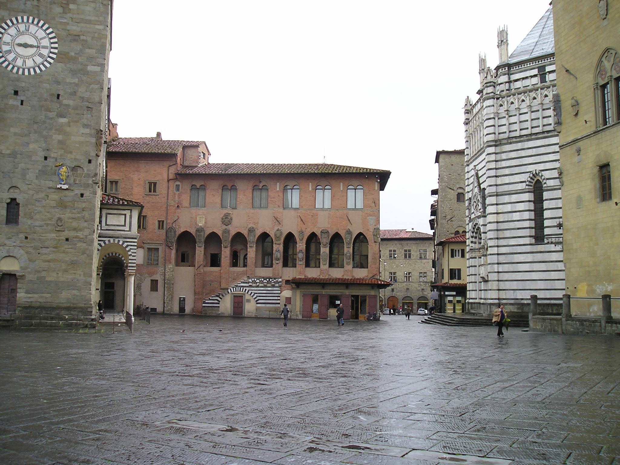 Pistoia piazza del Duomo